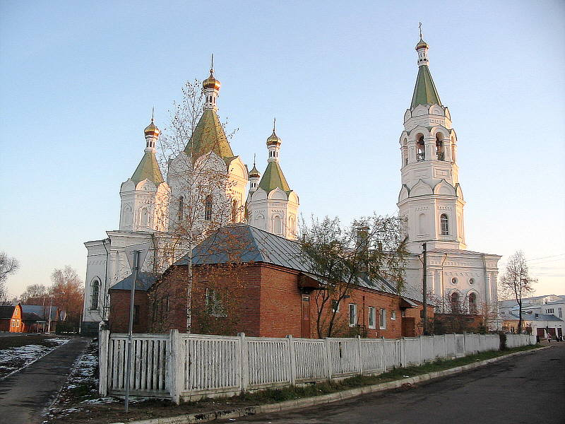 Храм Александра Невского, г. Егорьевск